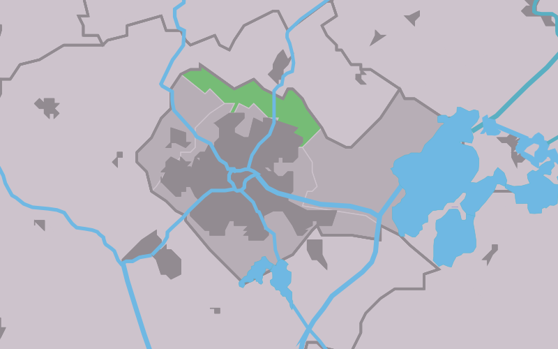 Kaartsje fan himrik fan Loaiïngea